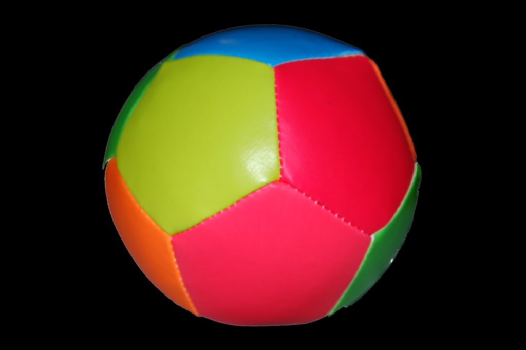 Illustration de l'espace dodécaédrique de Poincaré (qui ressemble à un ballon de foot). Photographie personnelle.